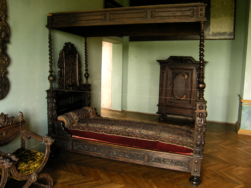 Olesko Castle